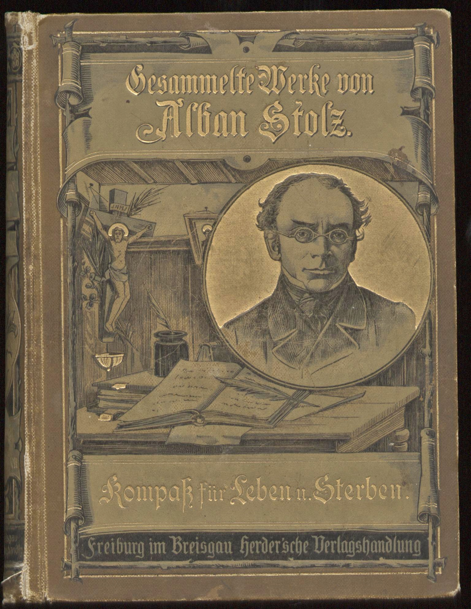 Alban Stolz, Buchcover